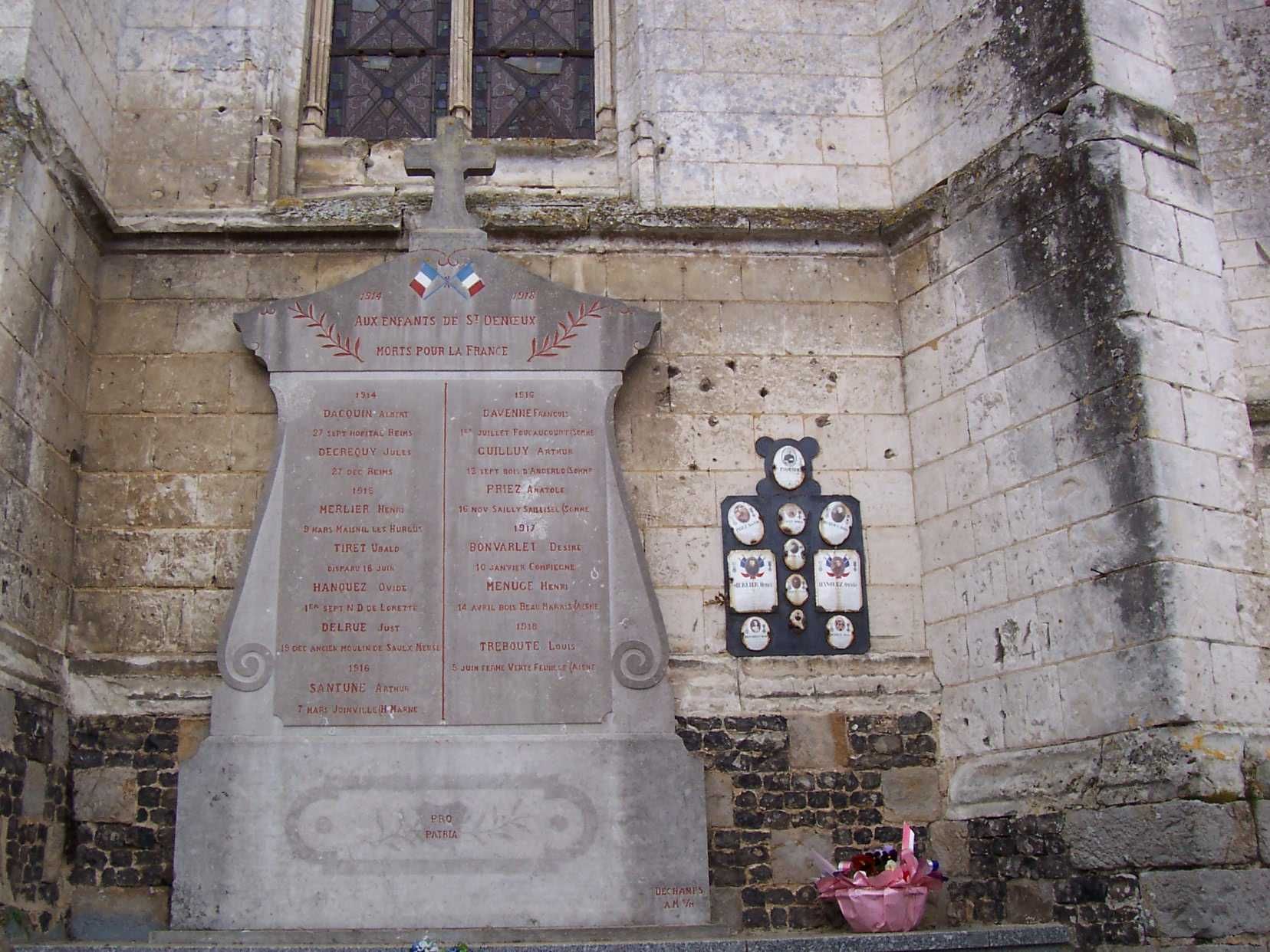 Monument aux morts de Saint-Denoeux